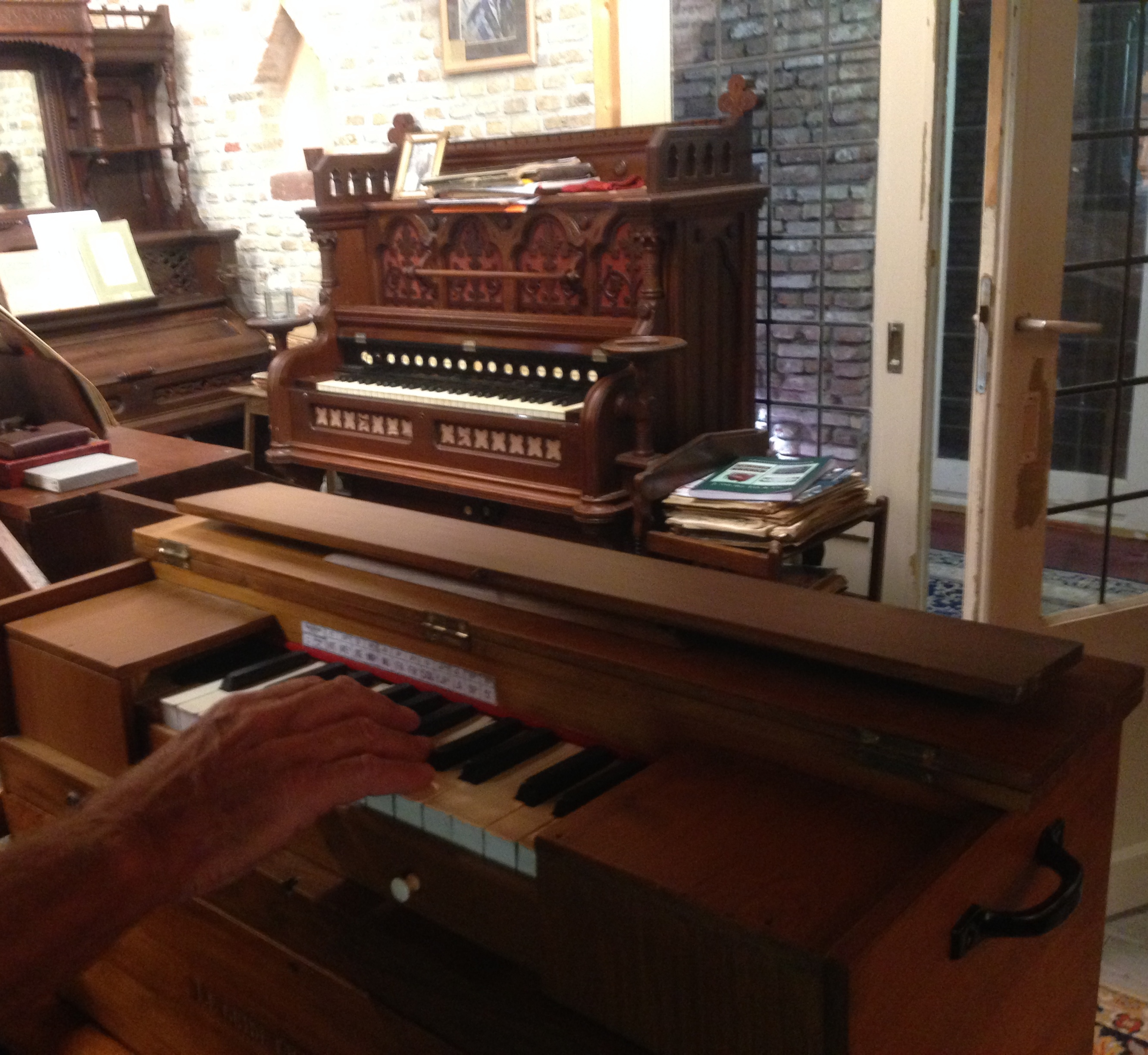 Harmonium Museum in Paasloo, Overijssel, Netherlands